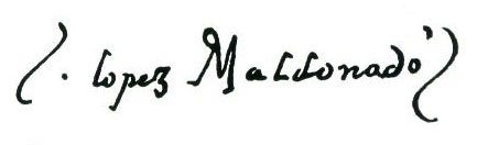 Firma del poeta español Gabriel López Maldonado